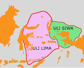 Daerah kekuasaan Kesultanan Ternate (Uli Lima) dan Kesultanan Tidore (Uli Siwa).